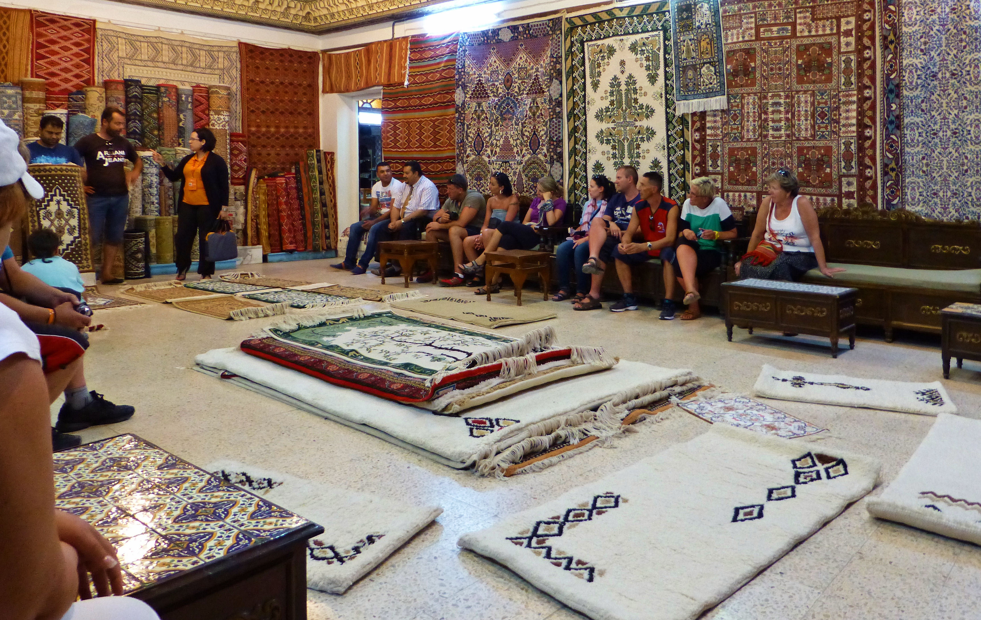 Tunezja, Kairouan,Muzeum du Tapis (Muzeum Dywanów)